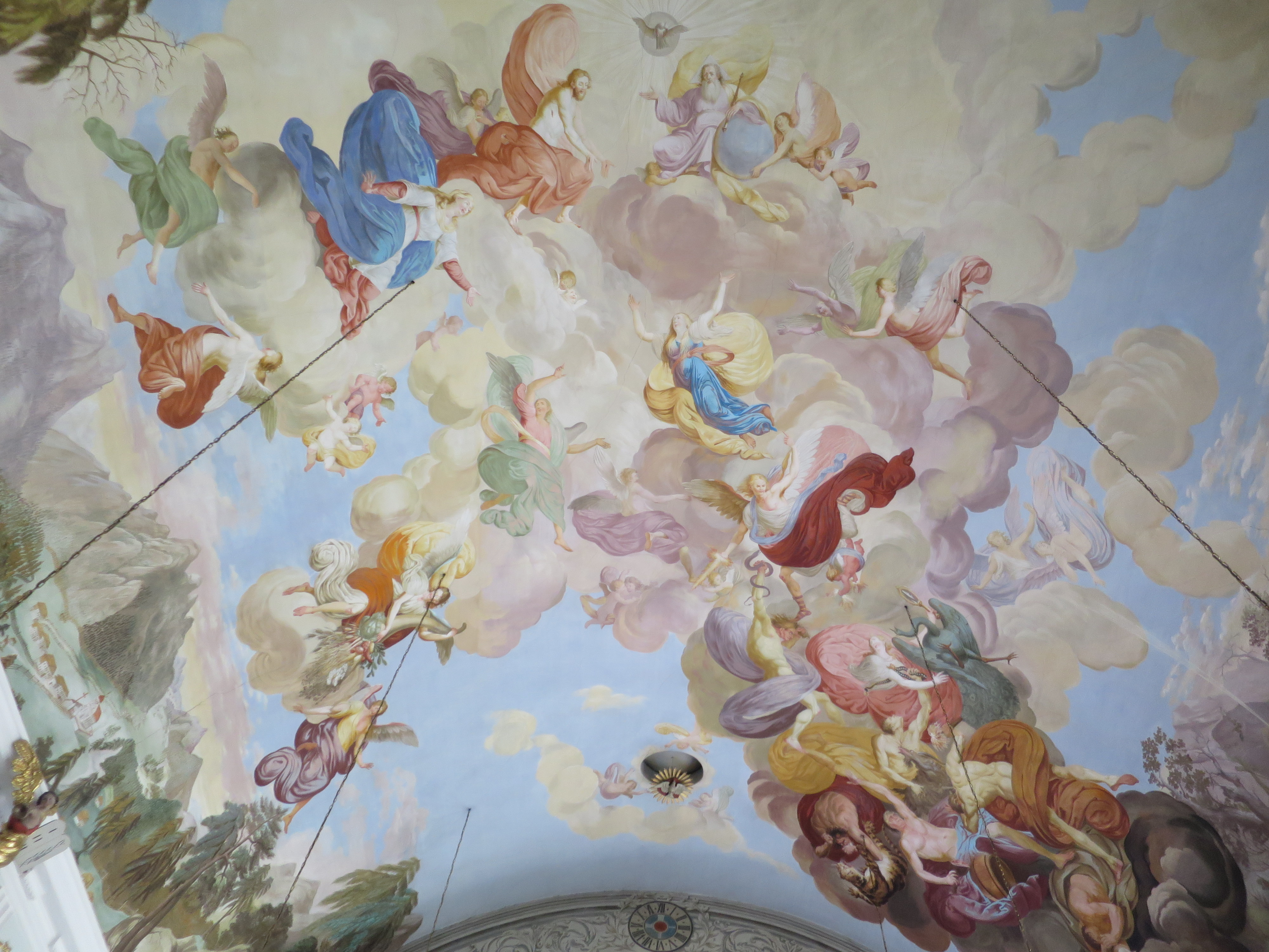 Detail des Langhausgemäldes von L.J. Puellacher (1776-1842). Aufnahme Mariens in den Himmel.